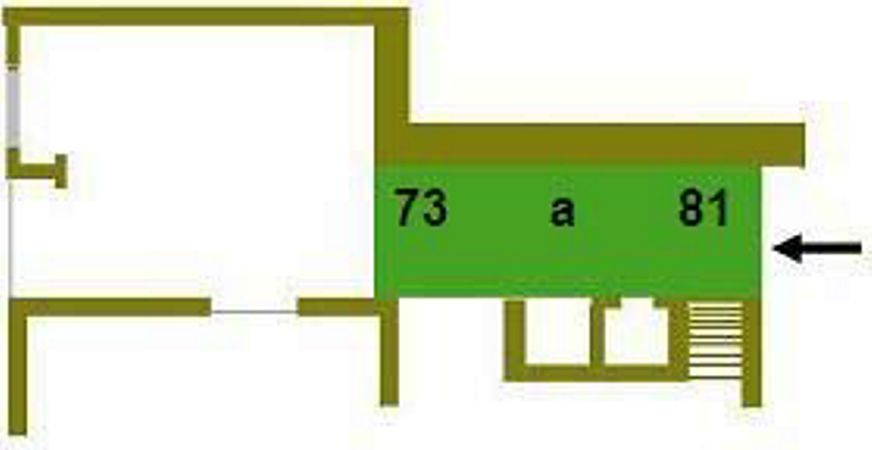 Distribución de las obras en el pasillo "perspectiva" del Museo Ulpiano Checa.